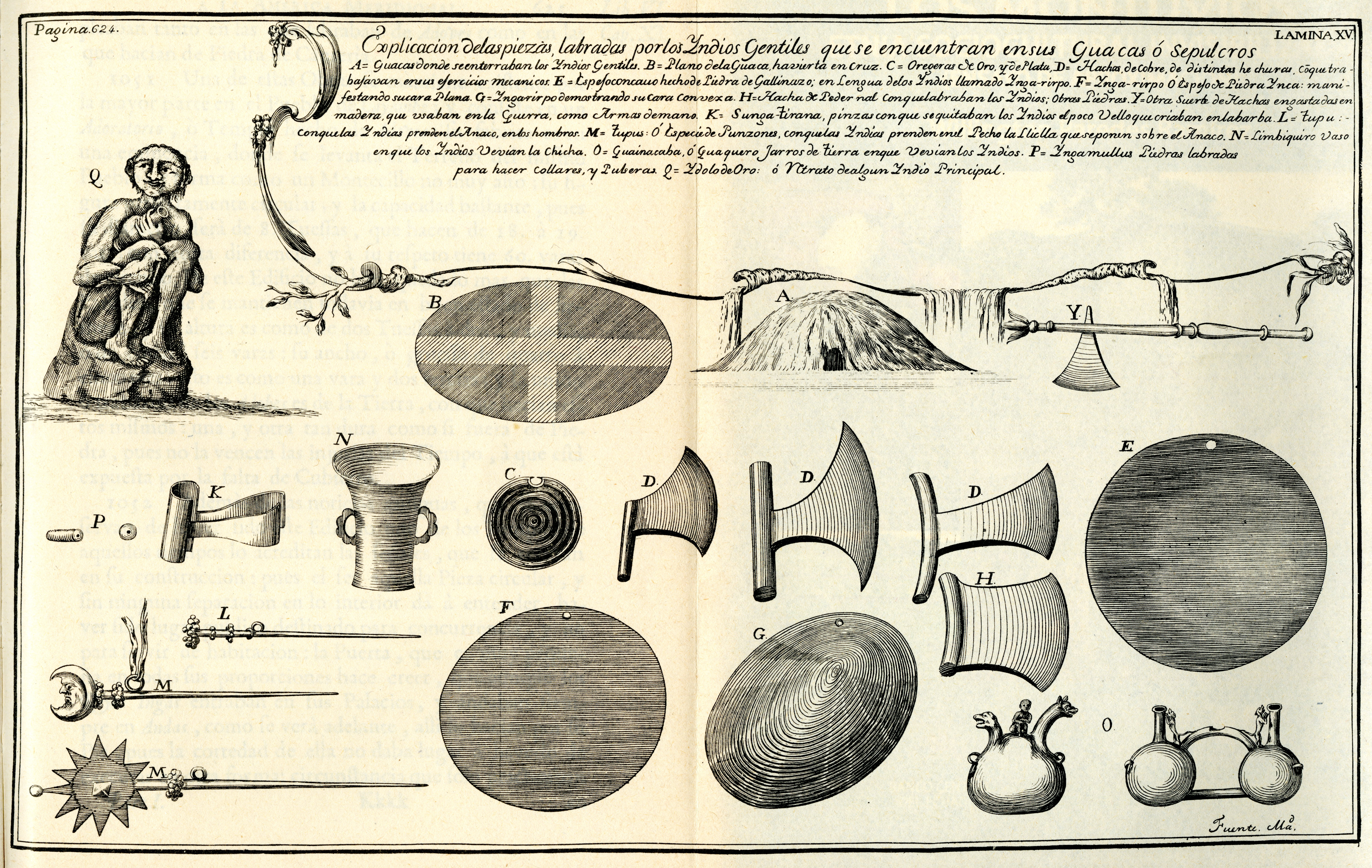 De Ulloa, Antonio y Jorge Juan. Relación Histórica del Viaje a la América Meridional, hecho de Orden de Su Majestad Católica para medir algunos Grados de Meridiano Terrestre, y venir por ellos en conocimiento de la verdadera Figura y Magnitud de la Tierra, con otras varias Observaciones Astronómicas y Físicas. Por Don Jorge Juan Comendador de Aliaga, en la Orden de San Juan, Socio correspondiente de la Real Academia de las Ciencias de París; y Don Antonio de Ulloa de la Real Sociedad de Londres: ambos por Capitanes de Fragata de la Real Armada. Primera Parte / Tomo I. Impresa por la Orden del Rey Nuestro Señor en Madrid por Antonio Marín, Año de MCDDXLVIII (1748). Diapositiva de Consulta y acceso publico cuya información fue investigada de un libro y/o ejemplar de revisión custodiado en los Fondos Bibliográficos (Sección Siglo XVIII o Etapa Colonial) del Archivo Histórico del Guayas; Guayaquil, Ecuador.Consultado y compartido por el usuario J. Javier García A.